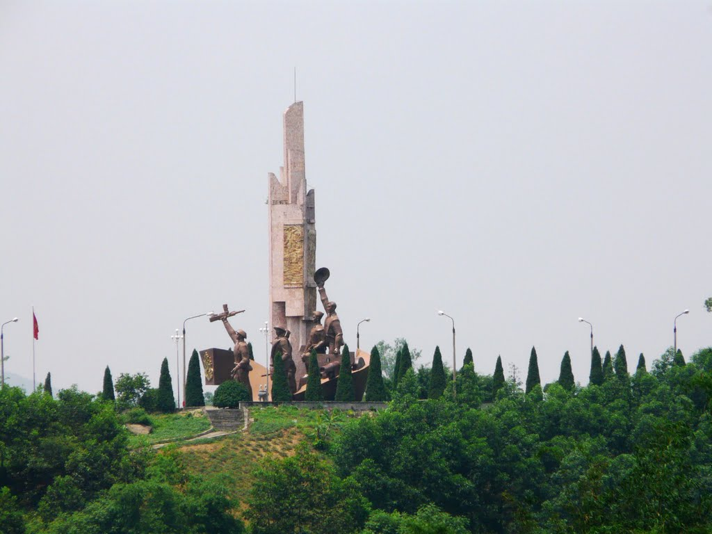 tuong dai